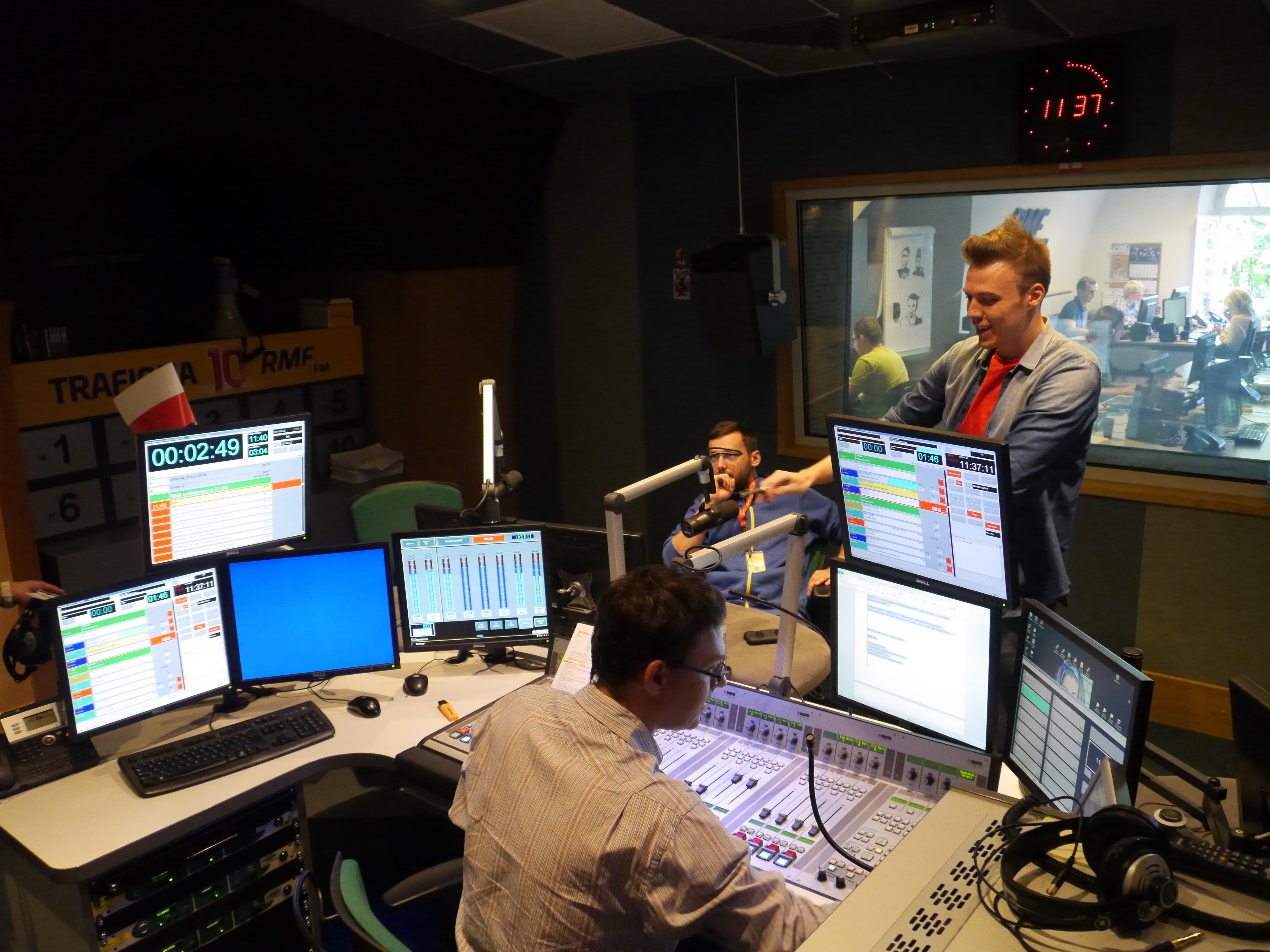 Siedziba radia RMF FM, al. Waszyngtona 1, 30-204 Kraków This photo was taken with Panasonic Lumix DMC-GH3 camera, thanks to Panasonic. You can see all photographs in category: Taken with Panasonic Lumix DMC-GH3.